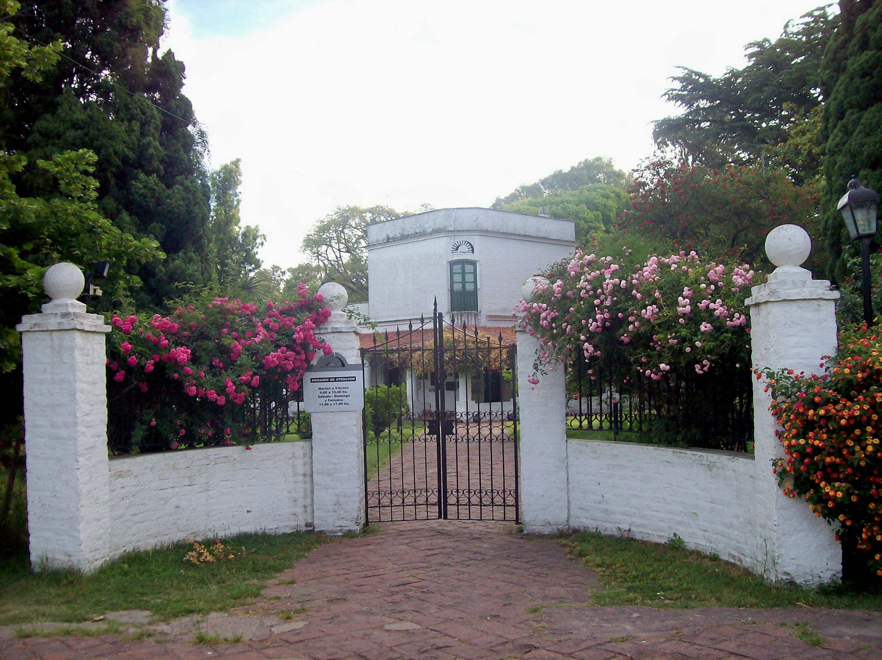 Museo Pampeano, en Chascomús, Provincia de Buenos Aires, Argentina.